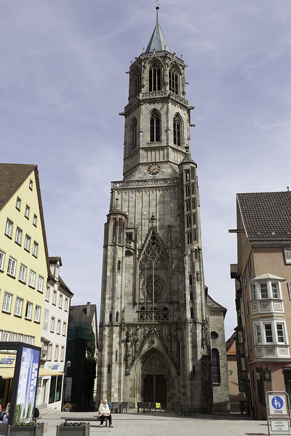 Kepellenkirche à Rottweil (Bade-Wurtemberg)